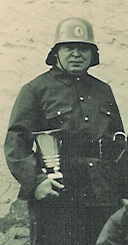 De Lex Federspil